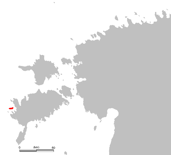 EE Vilsandi.PNG (island in Estonia / eiland in Estland)